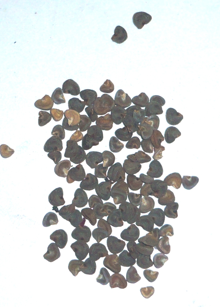 आंबडी बिया